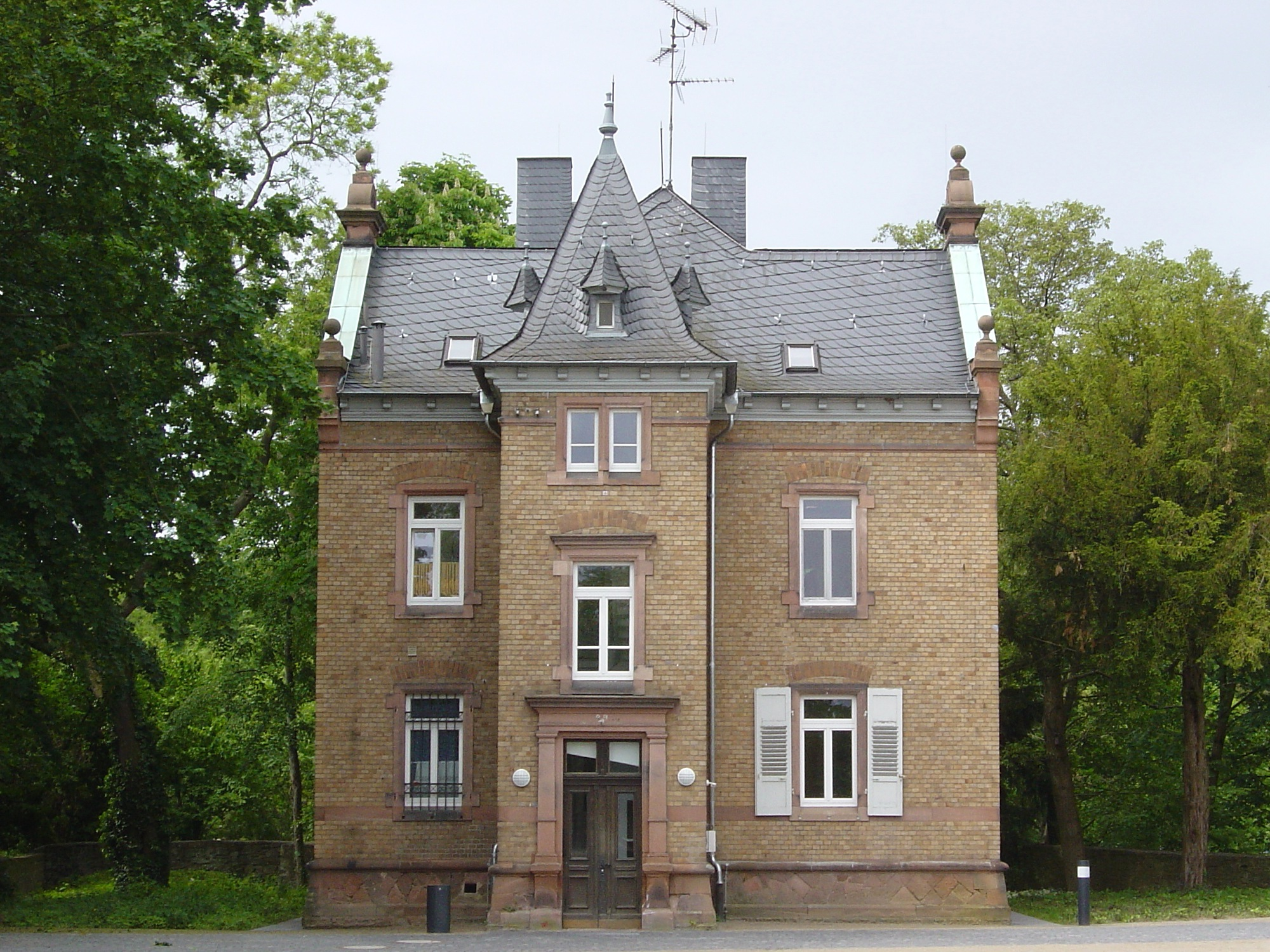 Forsthaus, Schloss Dornberg, Hauptstr. 1, 64521 Groß-Gerau